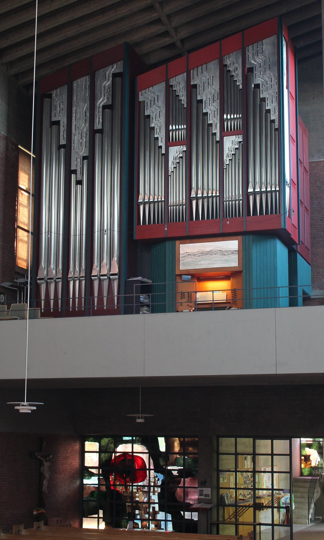 Orgel der Michaelskirche in Ottobrunn (1995, Rieger, II/31)